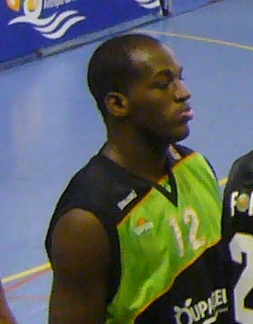 Le joueur français de basket-ball Ali Traore (ASVEL, à Agde, 34)